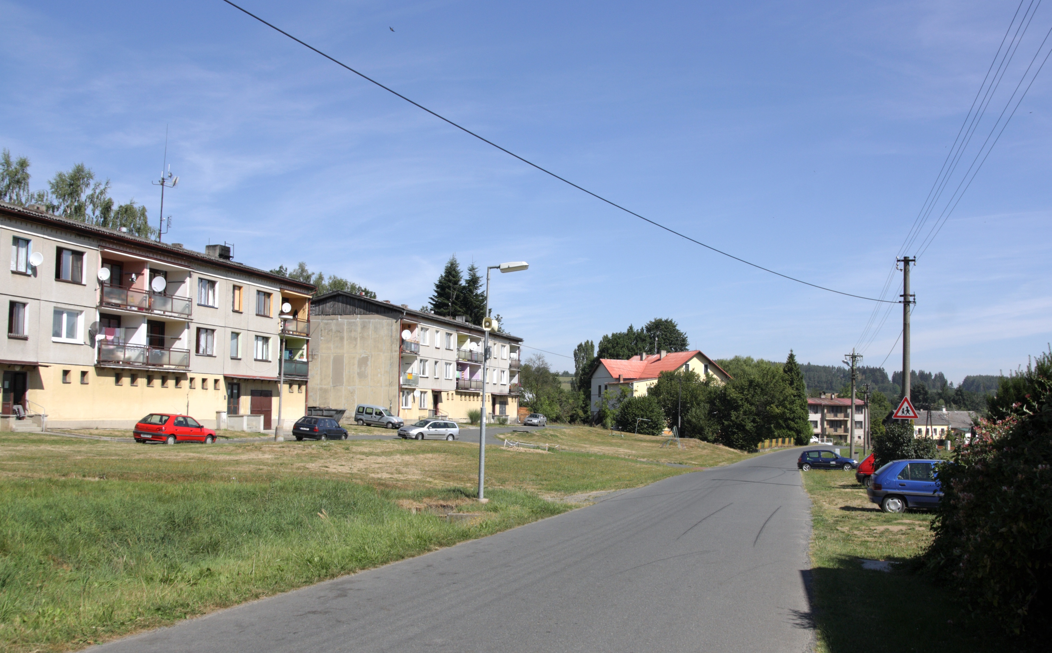 Mnichov (okres Domažlice) - jižní část obce.